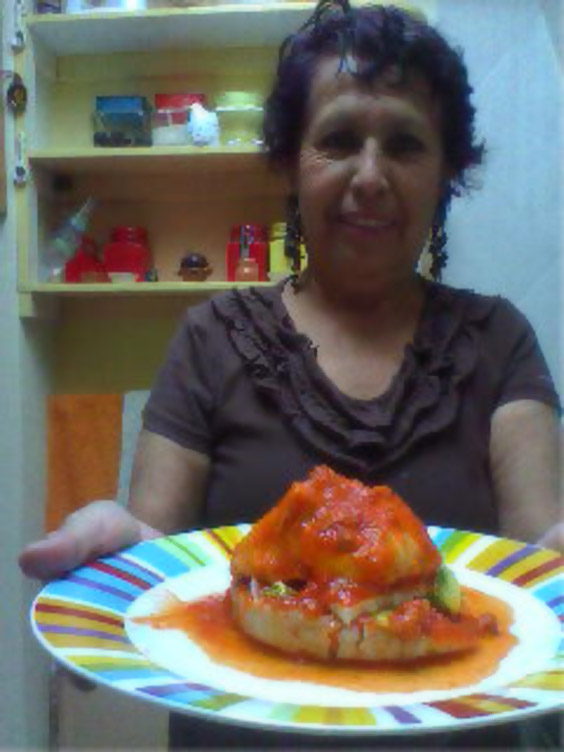 Pambazo en salsa de longaniza